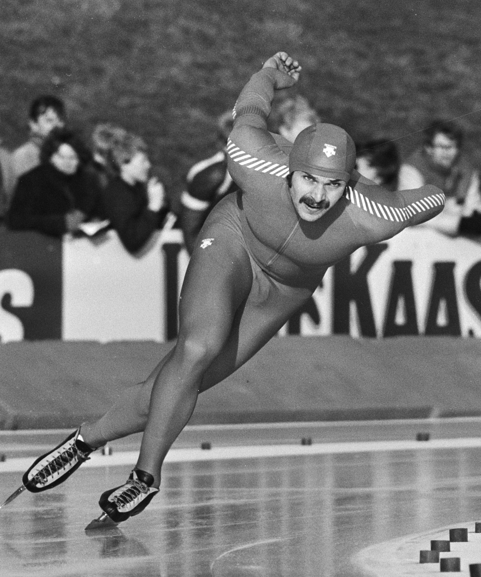 WK Sprint schaatsen in Alkmaar. Frode Ronning in aktie.